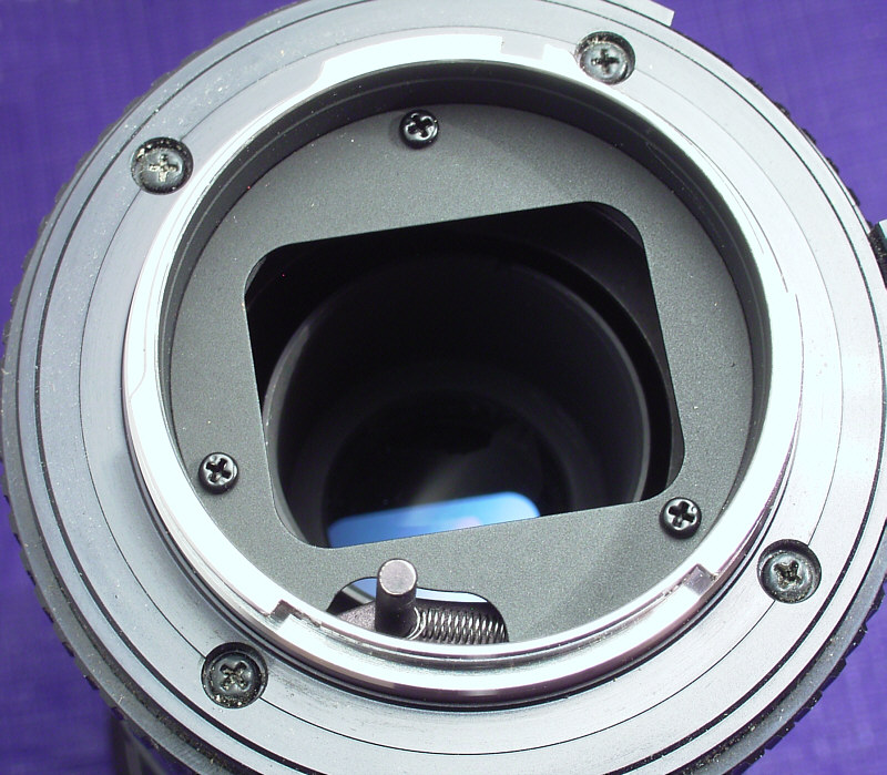 Lichtblende zur Veminderung unerwünschter Reflexionen (Streulicht) innerhalb eines Kleinbild-Wechselobjektivs (Minolta MD 4.5/300mm)